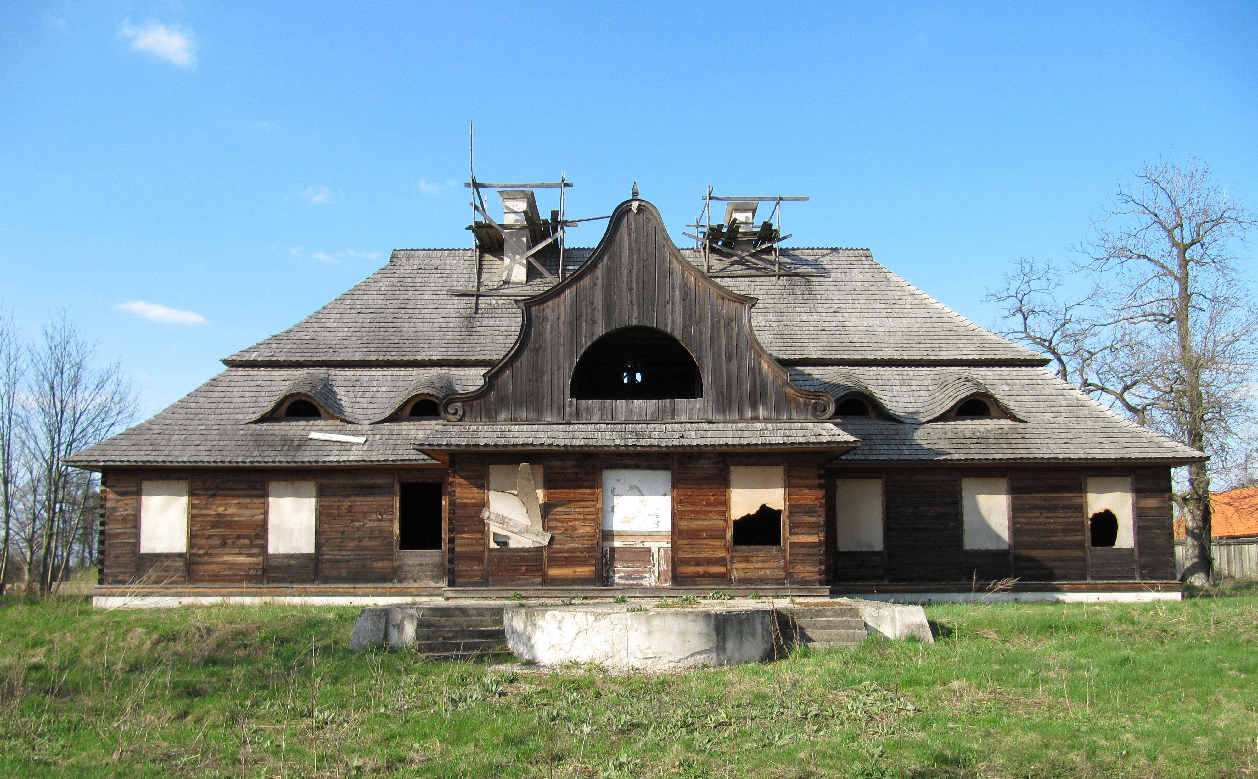 Dwór w Wodzieradach (zabytek nr rejestr. 72-IV-20 i 259/53)